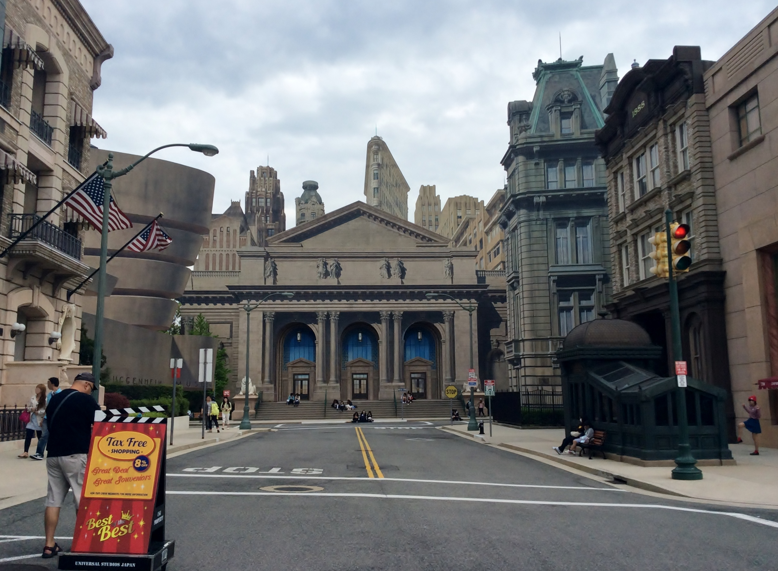 USJ構内の一風景を撮影。